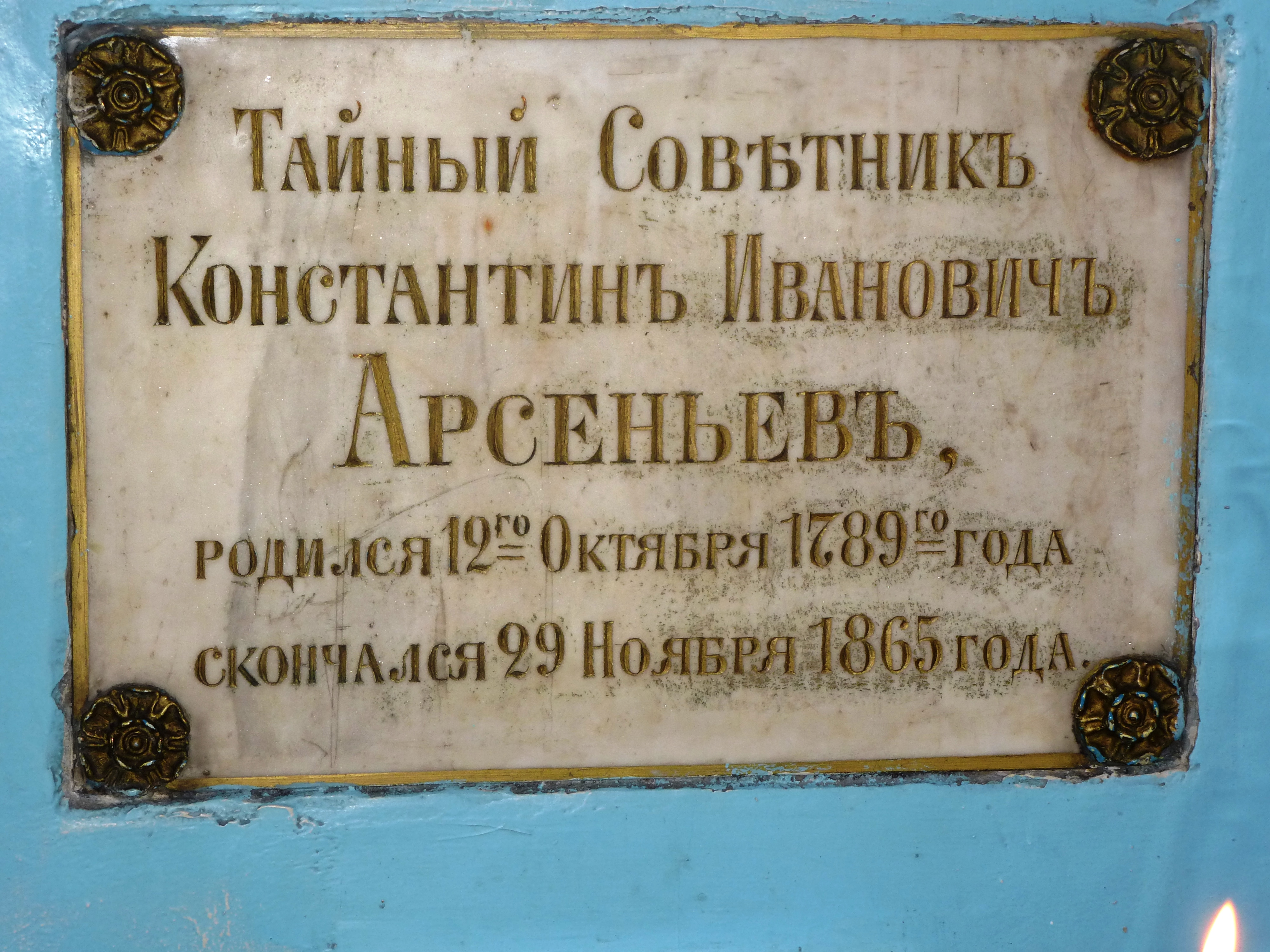 Памятная плита Арсеньеву Константину Ивановичу -учёному, действительному члену Российской академии (1836), академику в Крестовоздвиженском соборе г.Петрозаводска